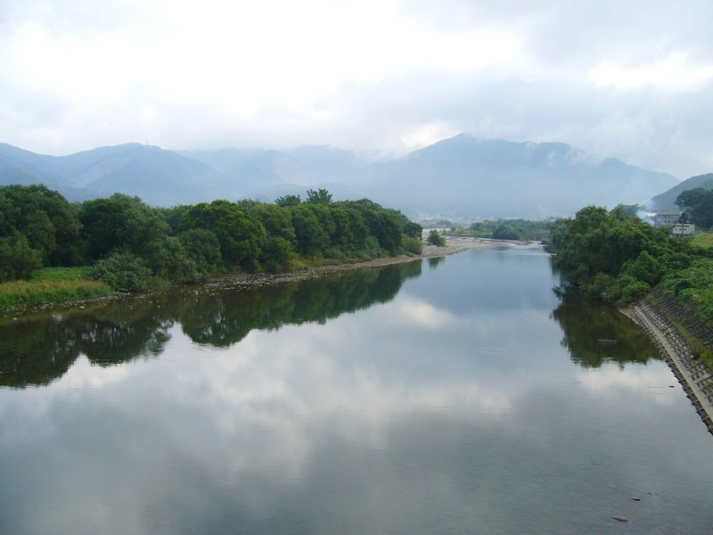 九頭竜川 福井県吉田郡松岡町（撮影当時）五松橋上から東望